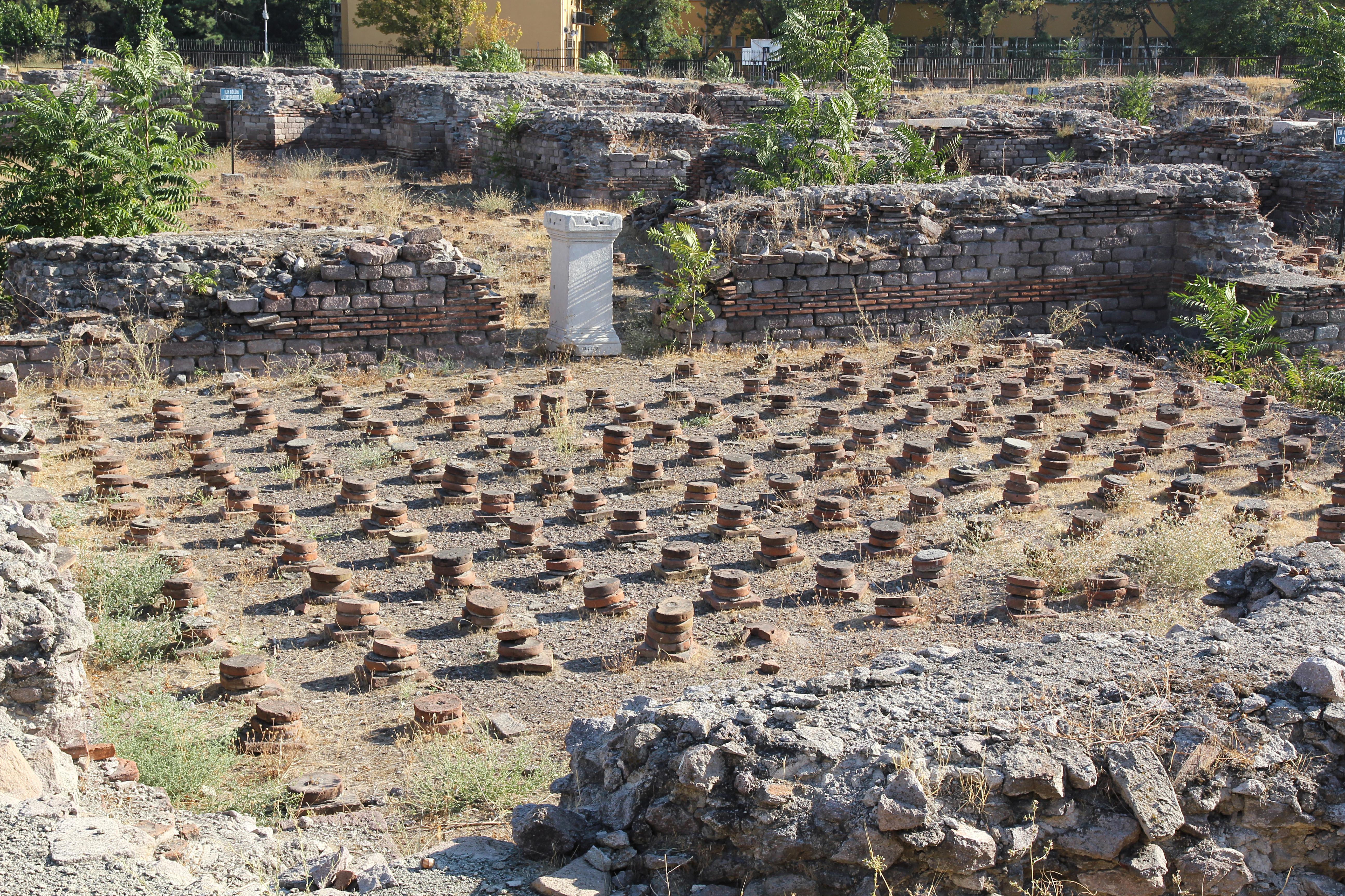 Caracalla-Thermen in Ankara, Apodyterium